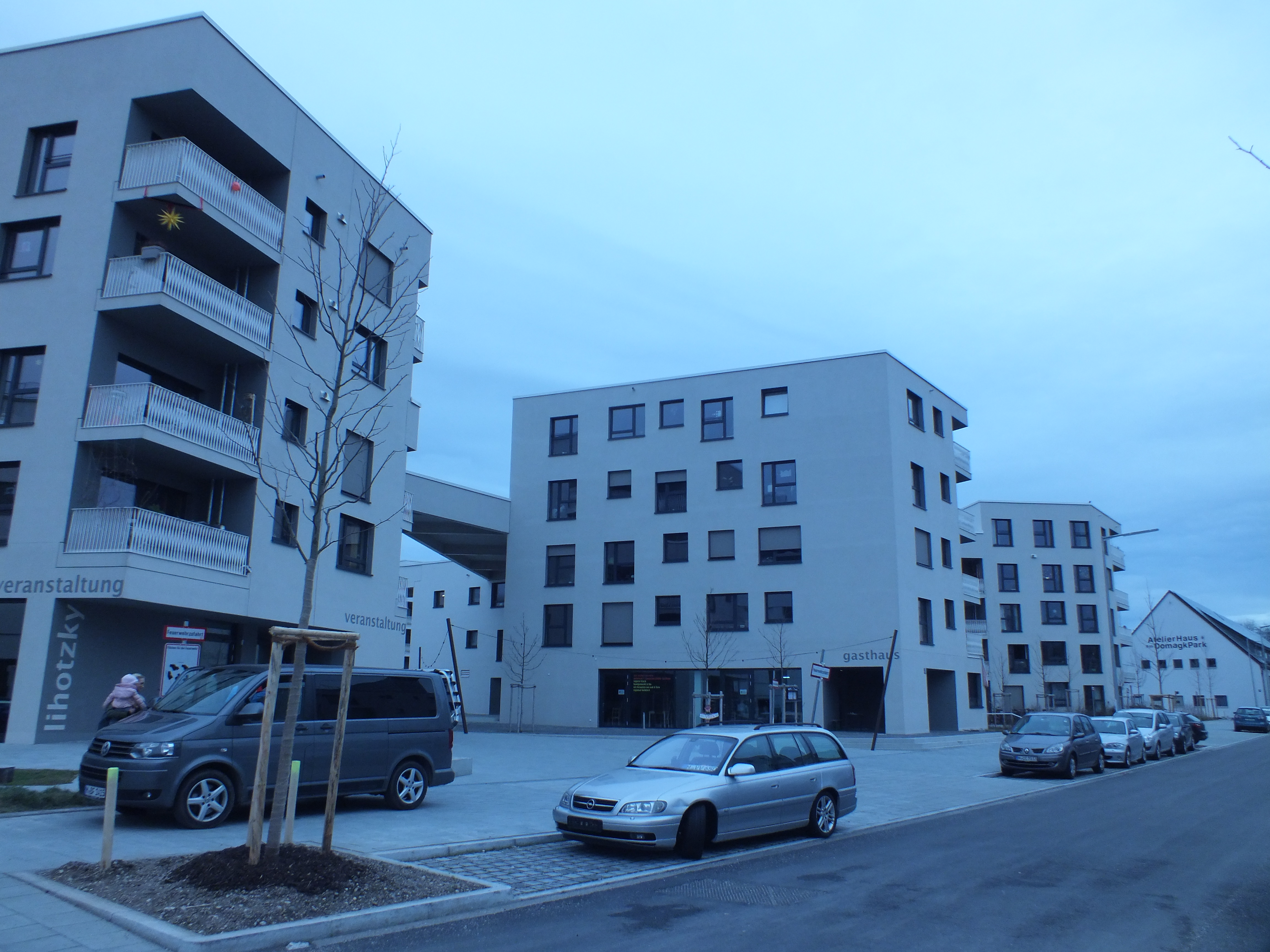 Domagkpark in München